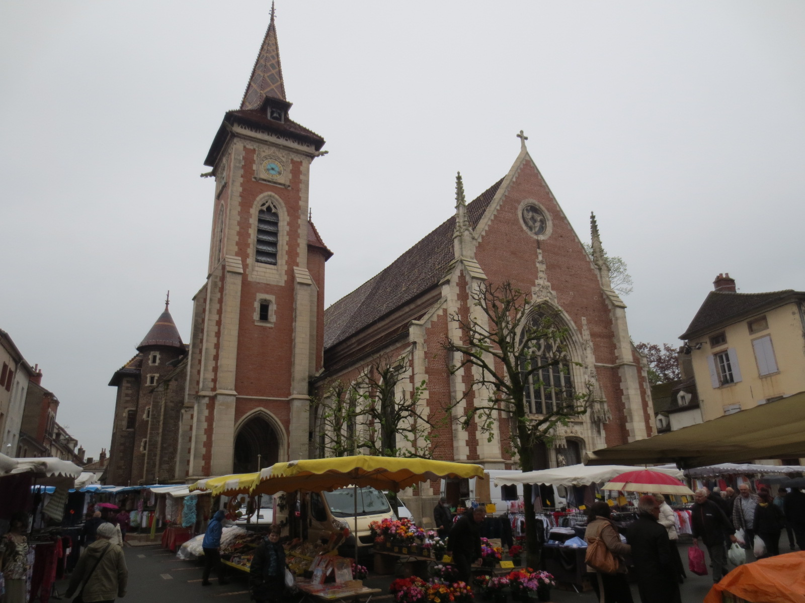 Markets in Louhans